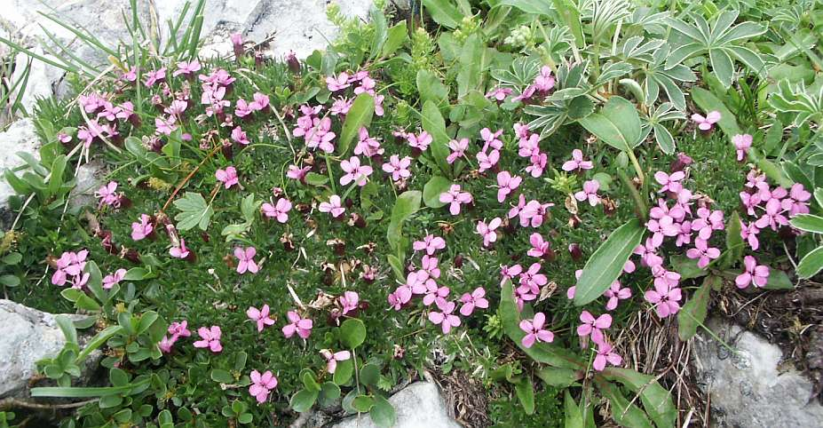 Gewöhnliches Stängelloses Leimkraut, Kalk-Polsternelke (Silene acaulis subsp. acaulis) Fundort: Nähe Liezener Hütte, Wörschach, Österreich